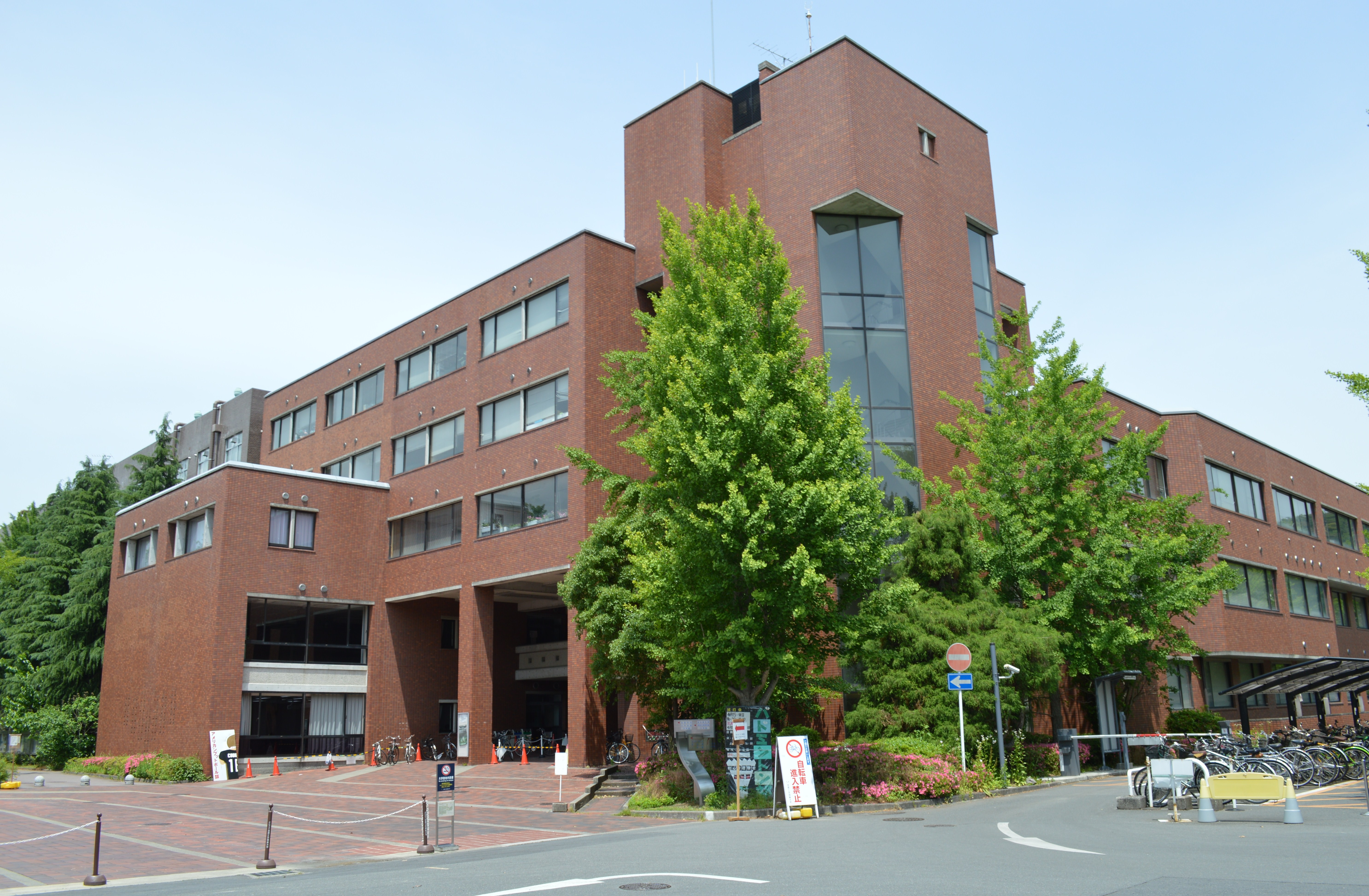 京都市左京区松ヶ崎 京都工芸繊維大学松ヶ崎キャンパス 中央西門から見た1号館